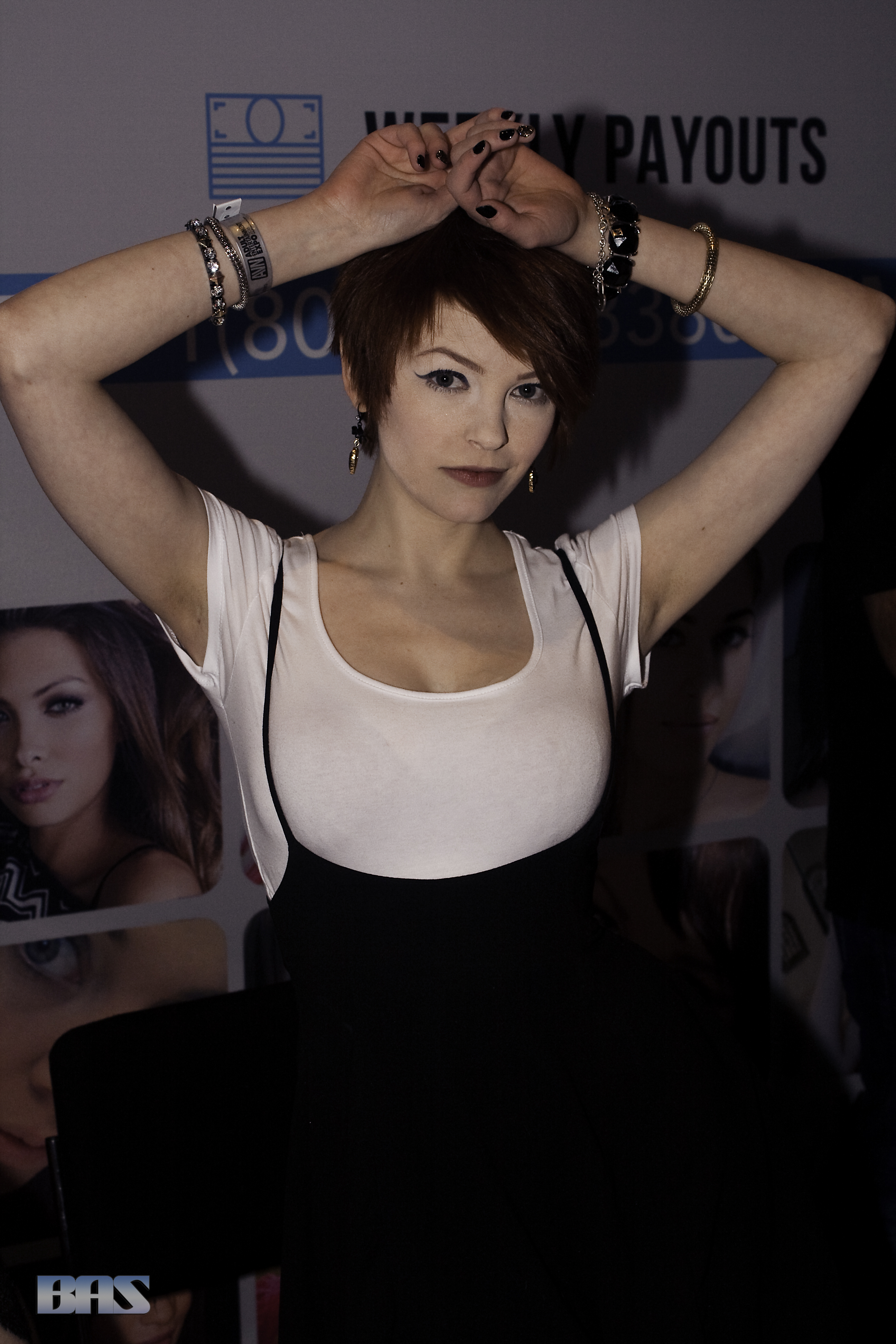 AEE16_0364bas